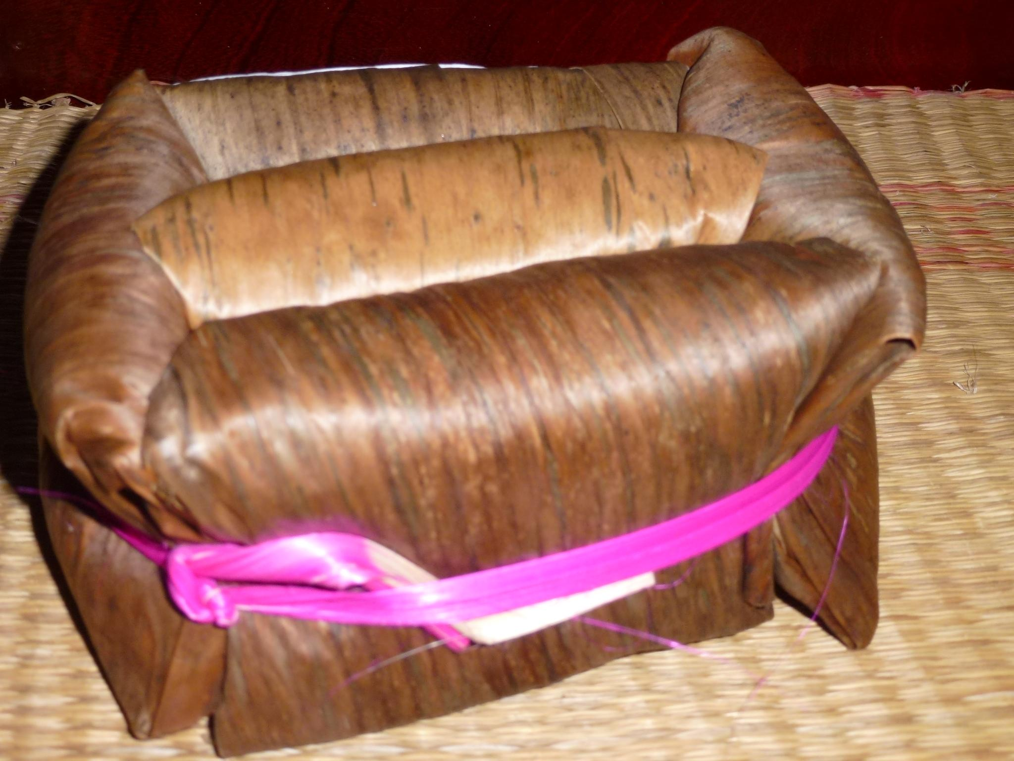 Bánh gai Tứ Trụ, huyện Thọ Xuân, Thanh Hóa, Việt Nam